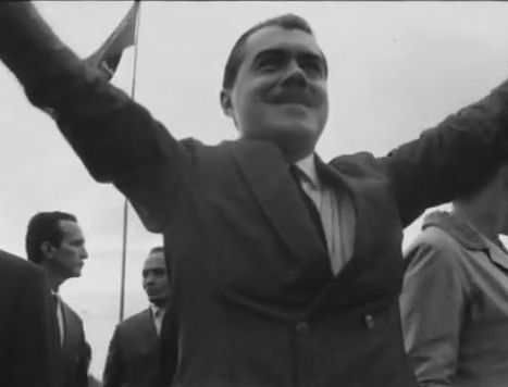 José Sarney tomando posse como governador do Maranhão em 1980